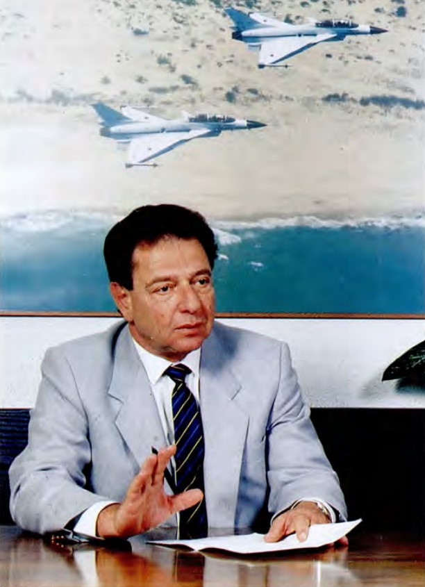 מנכ"ל התעשייה האווירית לישראל, משה קרת.